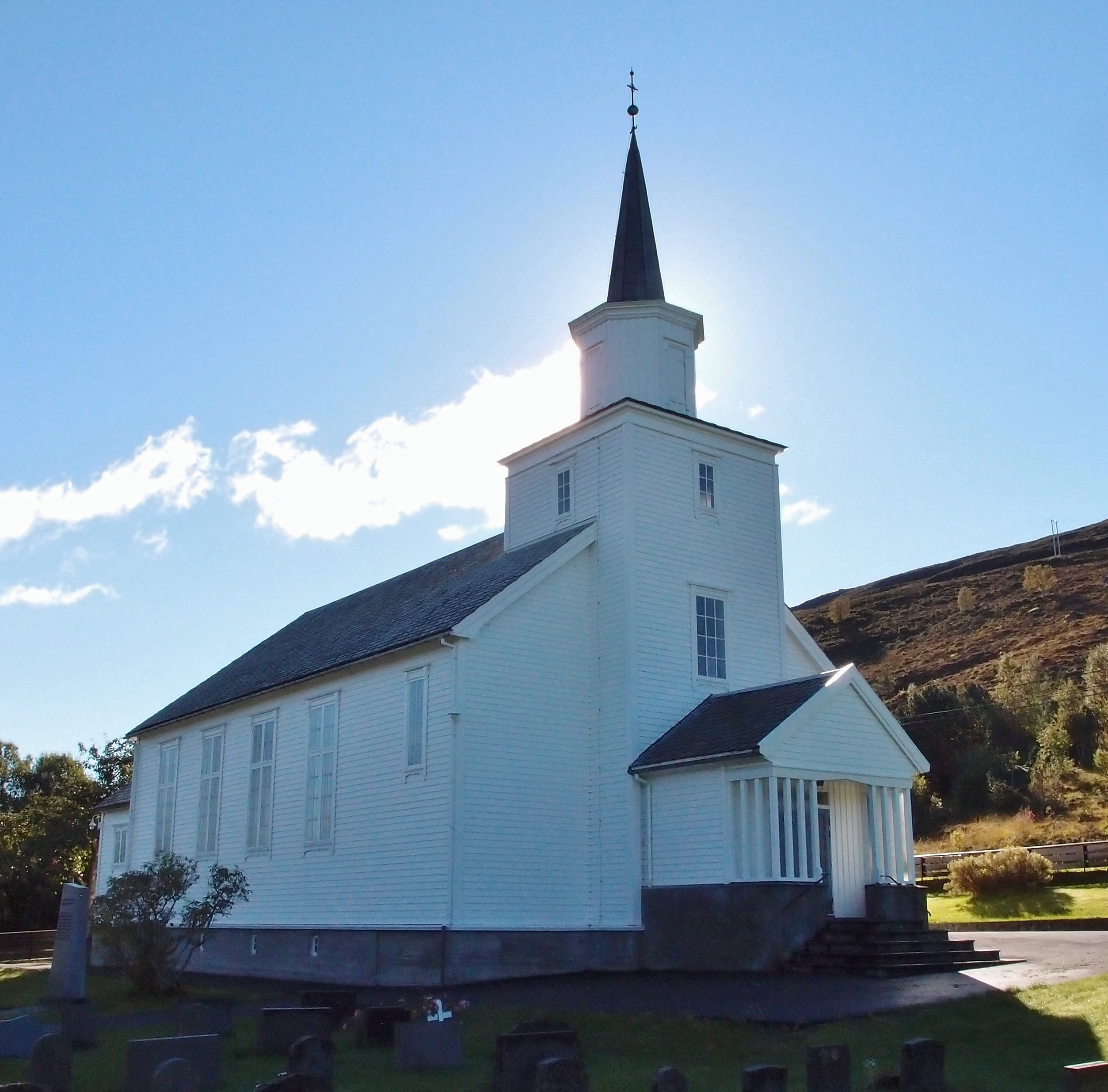 Åram kyrkje er ei langkyrkje bygd i 1927 i tømmer med 300 sitjeplassar. Arkitekt og byggmeister var Sivert Storegjerde. Kjelde: Kulturnett Møre og Romsdal.